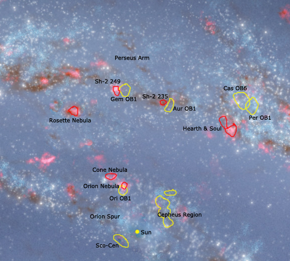 Mappa della regione galattica Gem OB1